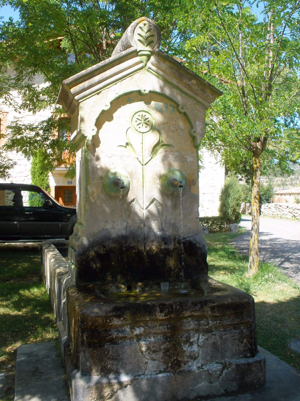 Fuente de Moradillo del Castillo (Burgos)